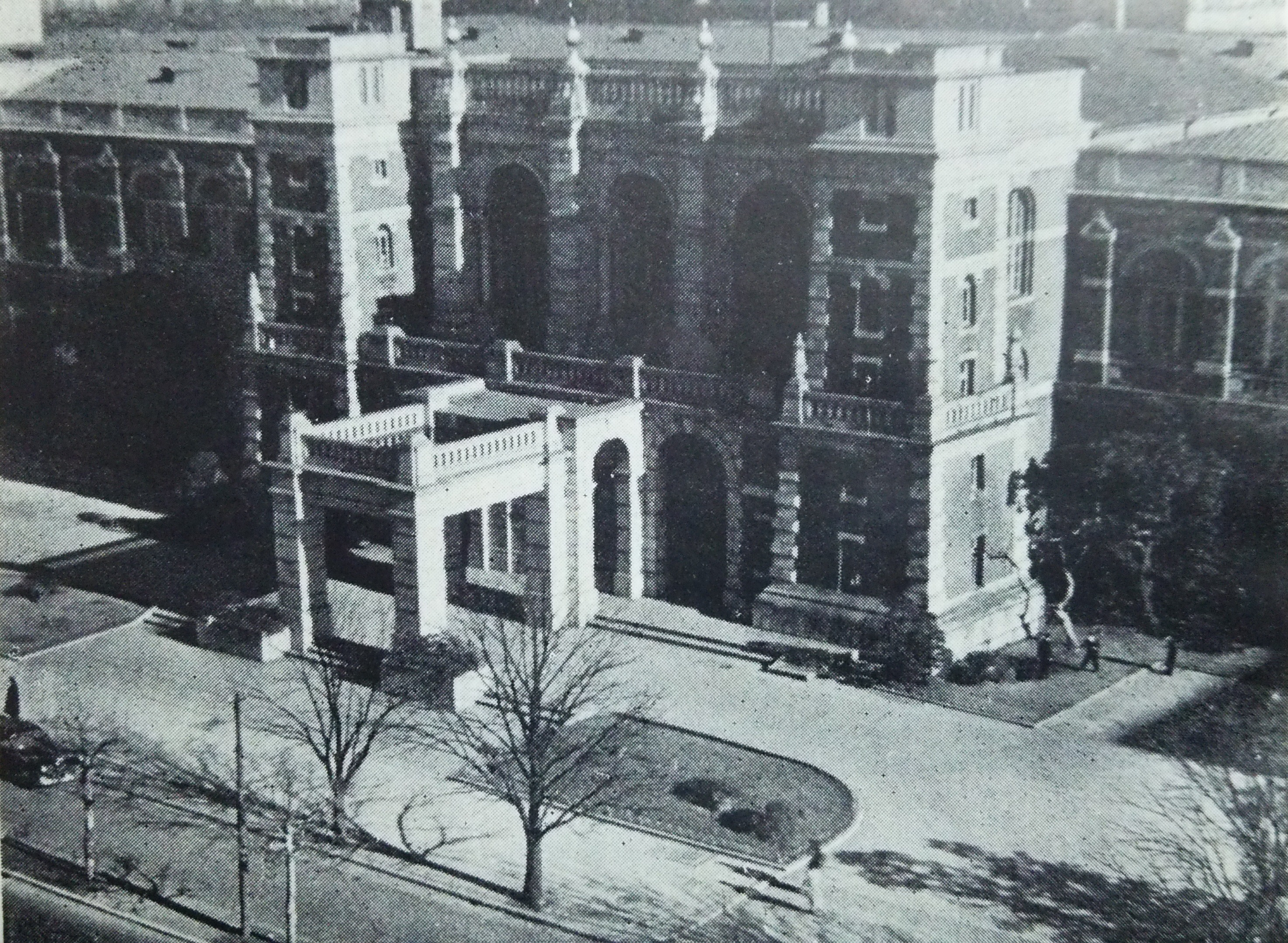 日本の最高裁判所（1956年以前）